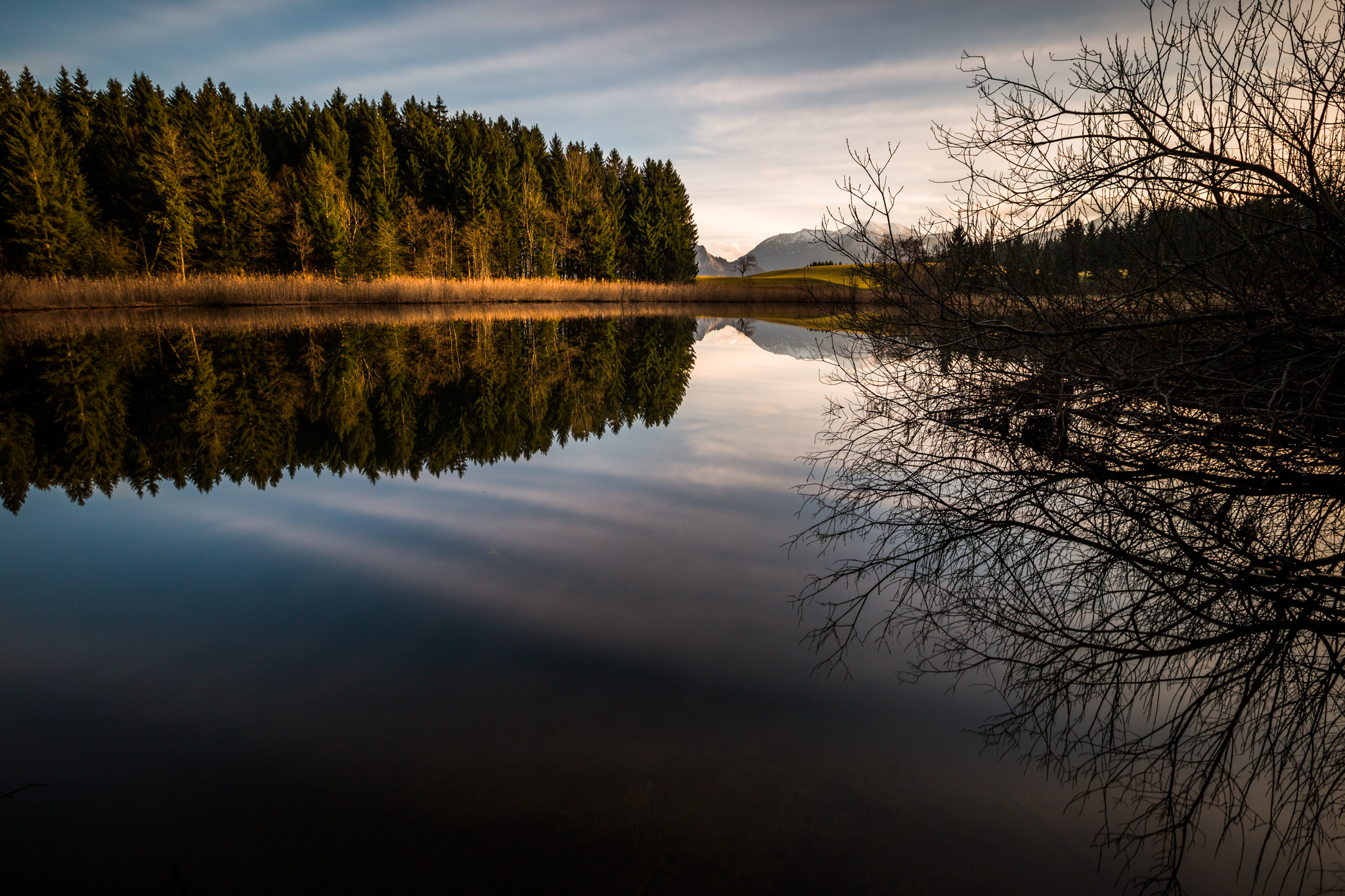 Egelsee in Unterach This media shows the nature reserve in Upper Austria with the ID n019.